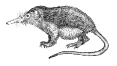 Solenodon cubanus (Atopogale cubana), Almik kubański, Cuban Solenodon